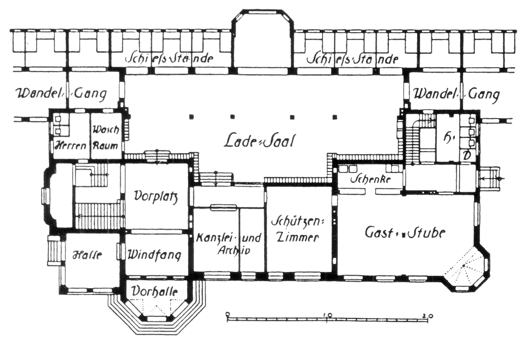 Münchner Haupt’ in Obersendling, Grundriss des Erdgeschosses